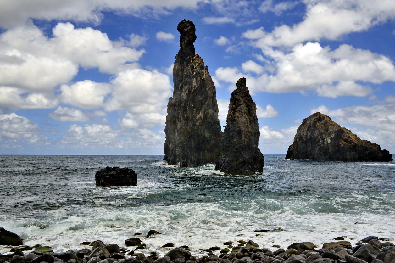 Ribeira da Janela, Madeira